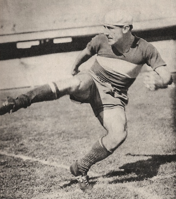 Severino Varela, jugador de fútbol uruguayo que se desempeñó durante la primera mitad del siglo XX en Club Atlético Peñarol (Uruguay) y el Club Atlético Boca Juniors (Argentina).